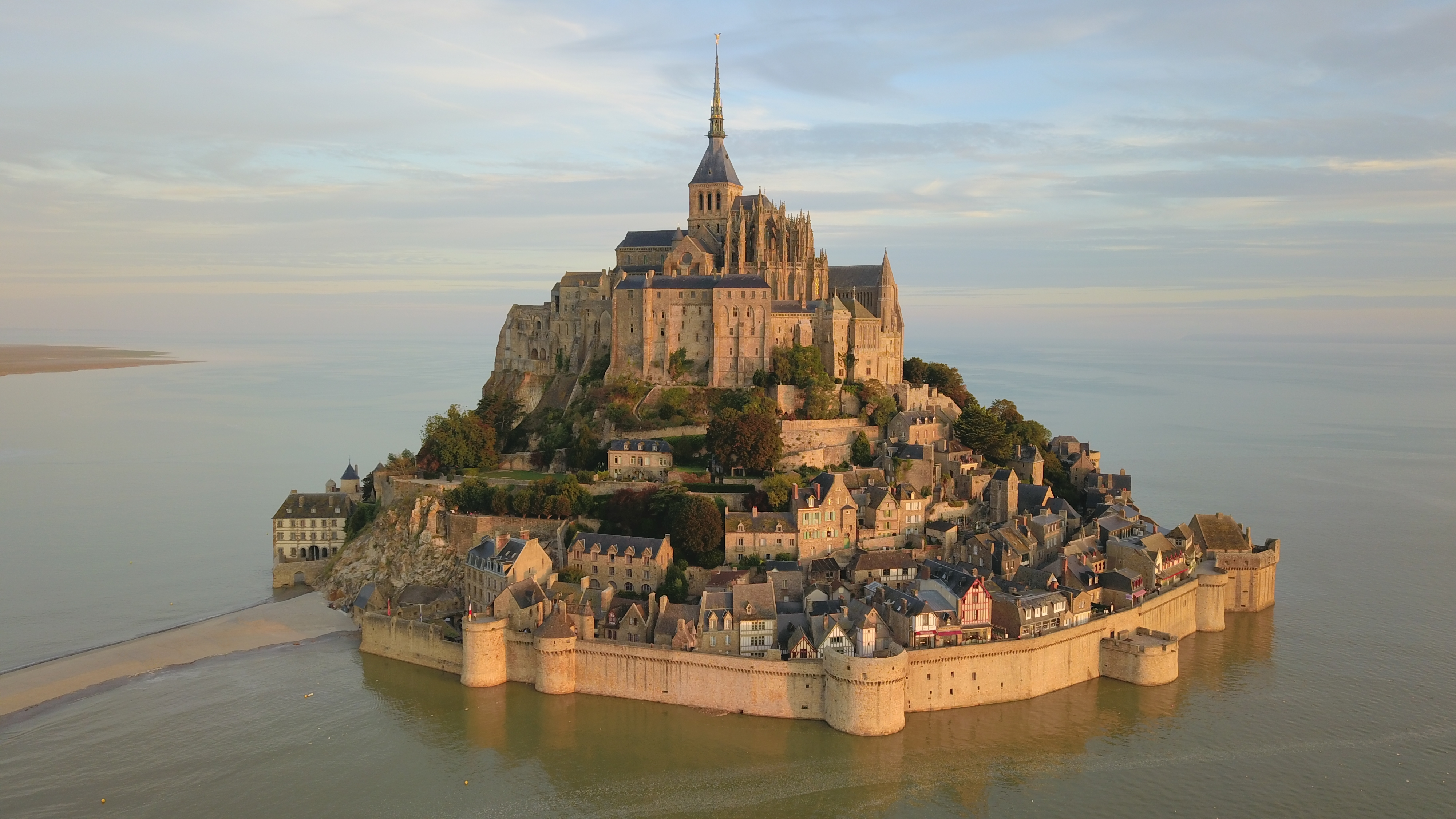 Le Mont-Saint-Michel vu du ciel au lever du soleil. Photo prise par un drone.